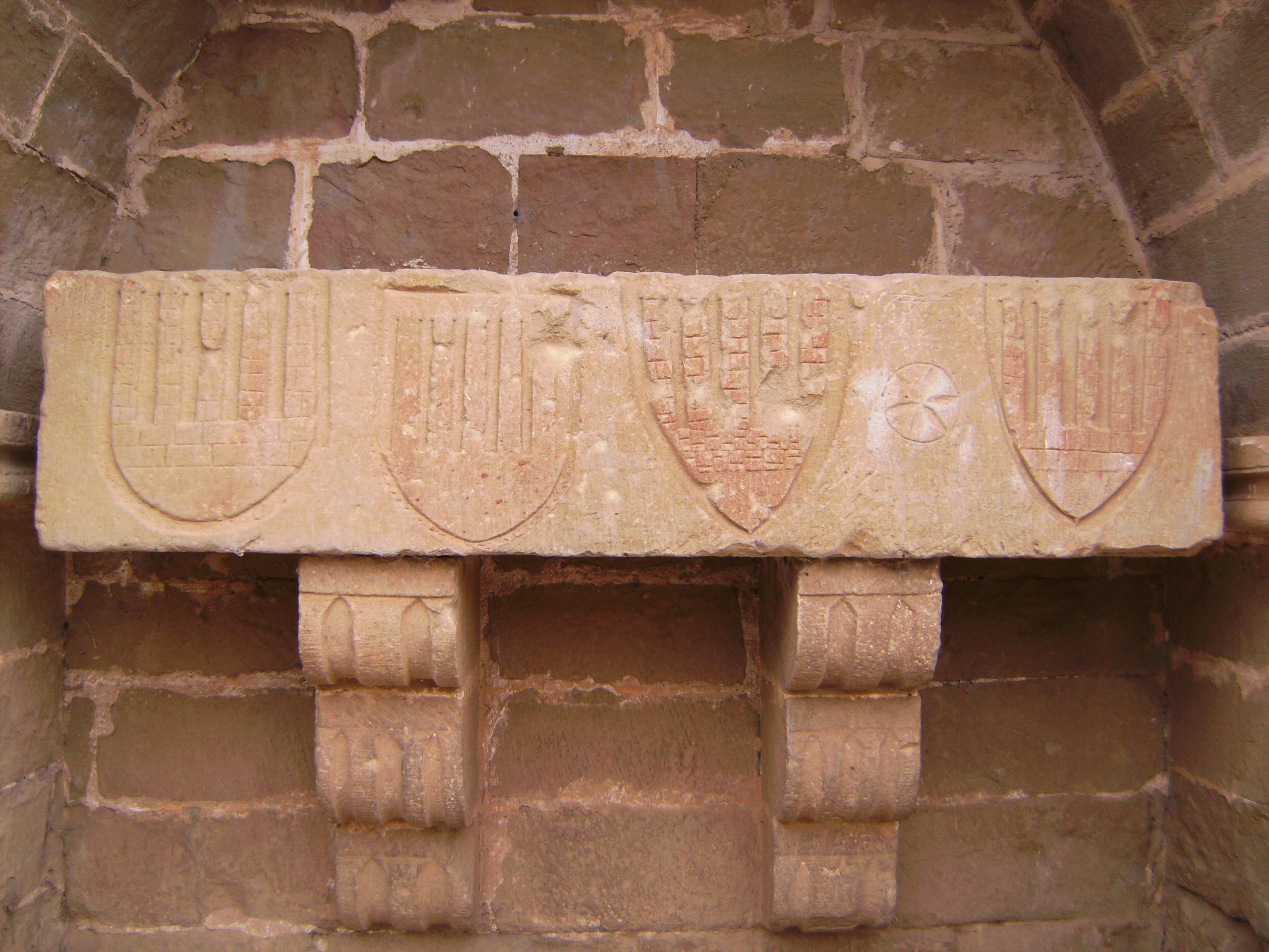 Ponts - Priorato de Sant Pere (Sepulcro al Lado de la Puerta)